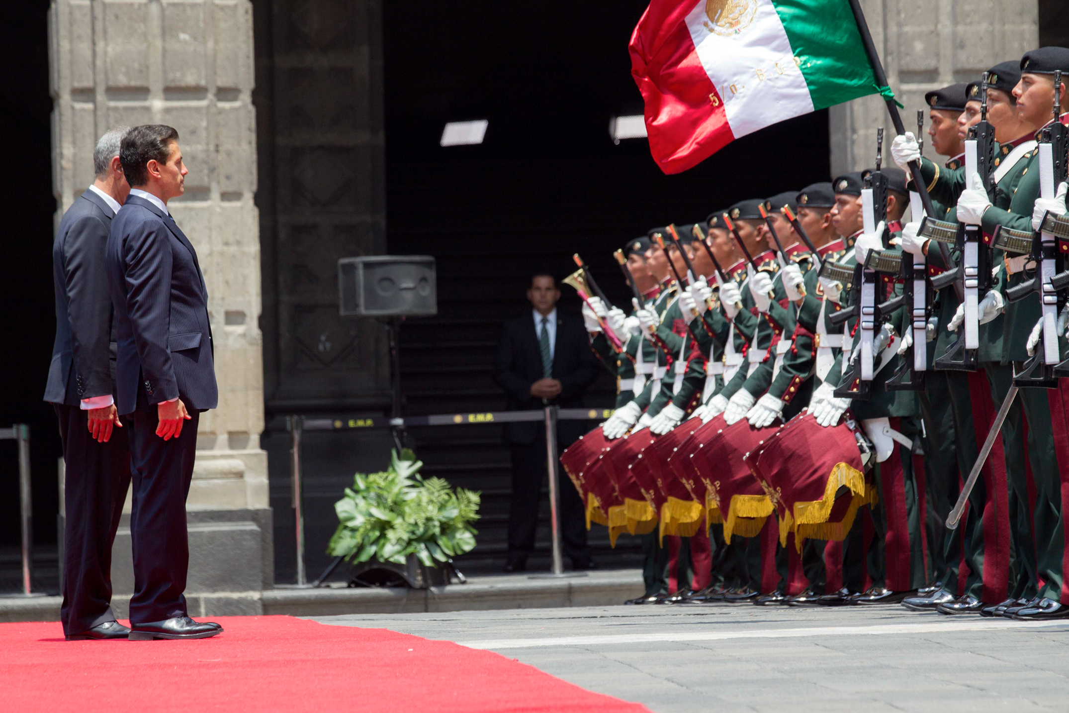 Es un honor dar la bienvenida a México al Presidente de la República Portuguesa, Marcelo Rebelo de Sousa. Su valiosa presencia da un renovado impulso al diálogo entre nuestros países.